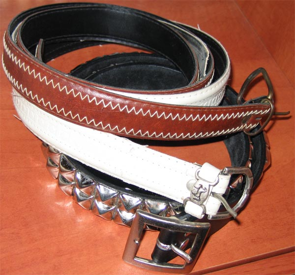 Belts